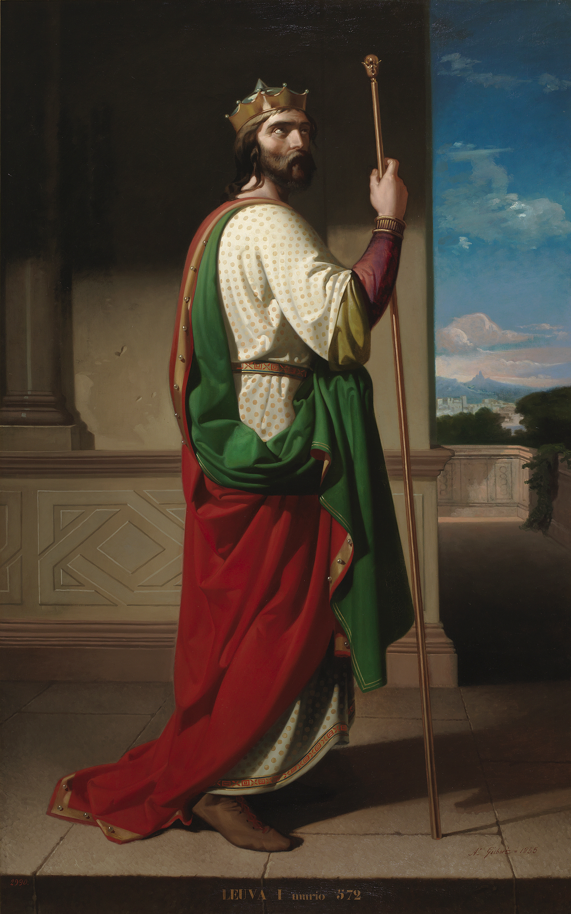 El lienzo representa a Liuva I († 572), rey de los visigodos. El rey está representado en pie, de perfil, con el rostro vuelto hacia el espectador. Viste túnica blanca y manto carmesí y apoya su mano en un largo cetro. Liuva I, que reinó entre 567 y 572, sucedió al rey Atanagildo, y antes de ser proclamado rey en la ciudad de Narbona, había sido dux de Septimania. Con el fin de evitar conflictos innecesarios, asoció al trono a su hermano y sucesor Leovigildo, dux de Toledo, en quien delegó el gobierno de Hispania mientras reservaba para él el de la Galia. Con esta decisión tomada por Liuva I se rompió la tendencia de los anteriores reyes godos, quienes al llegar al poder intentaban afianzarse en él.